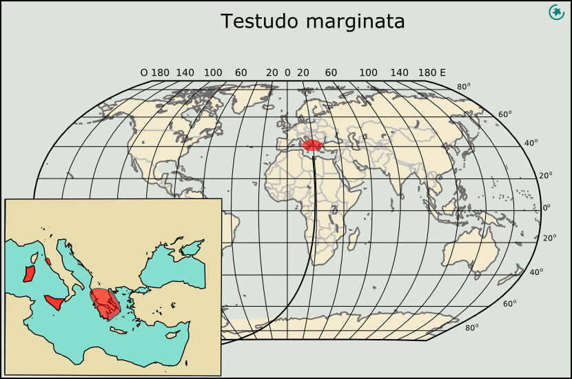 Mapa de distribucion actual de testudo Marginata